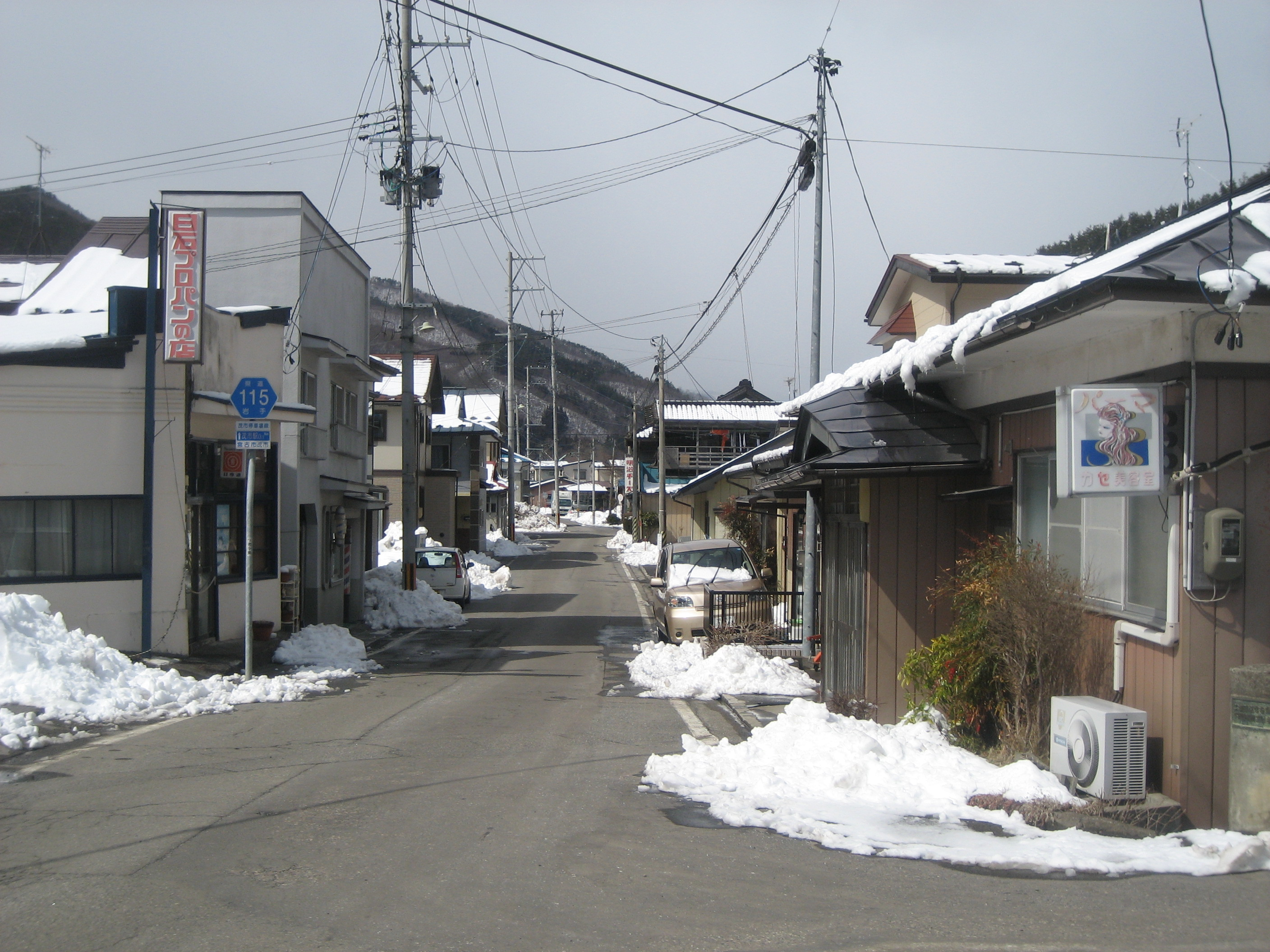 岩手県道115号線宮古市茂市付近